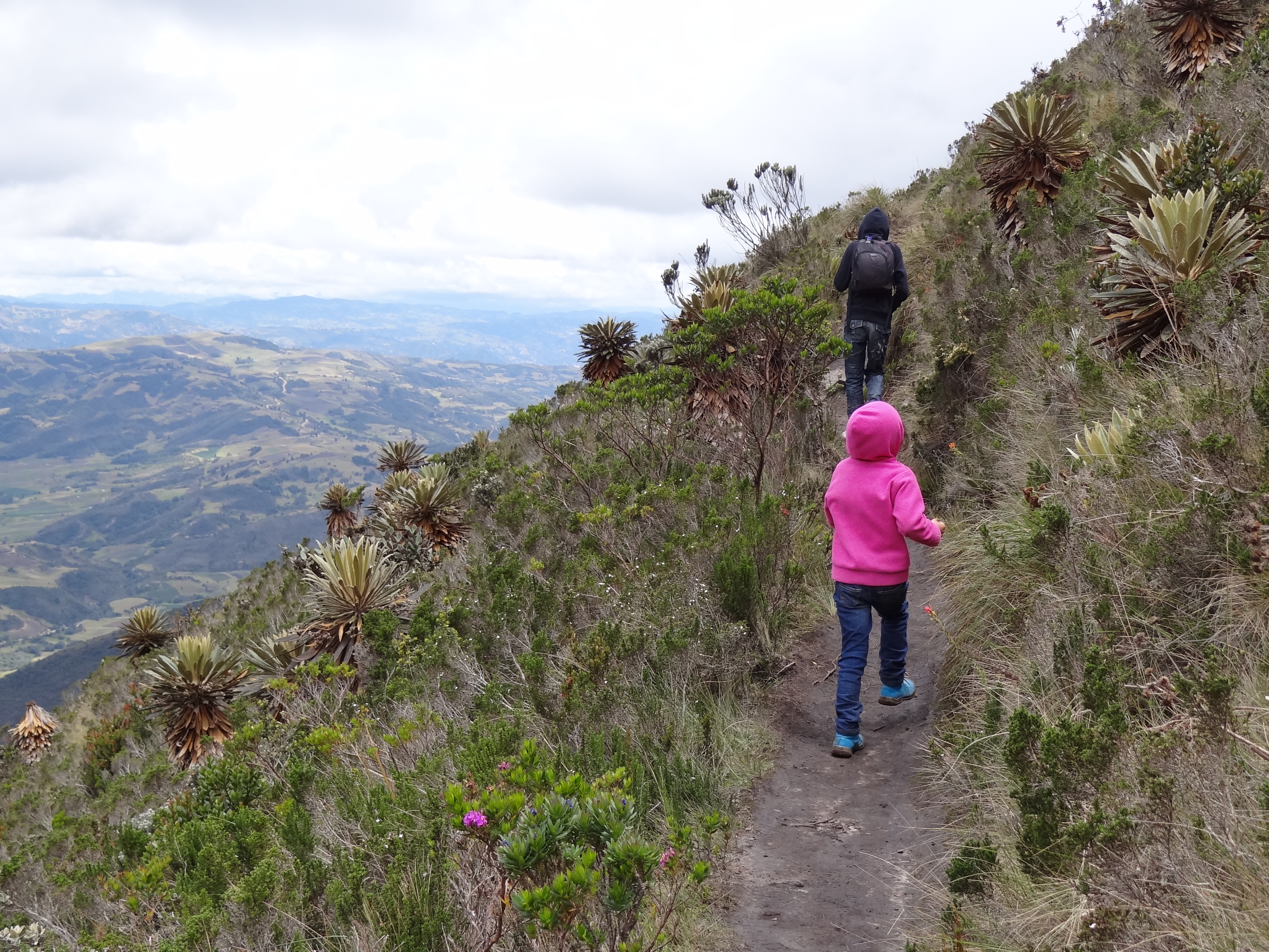 Sendero en el Santuario de fauna y flora Iguaque, departamento de Boyacá, Colombia